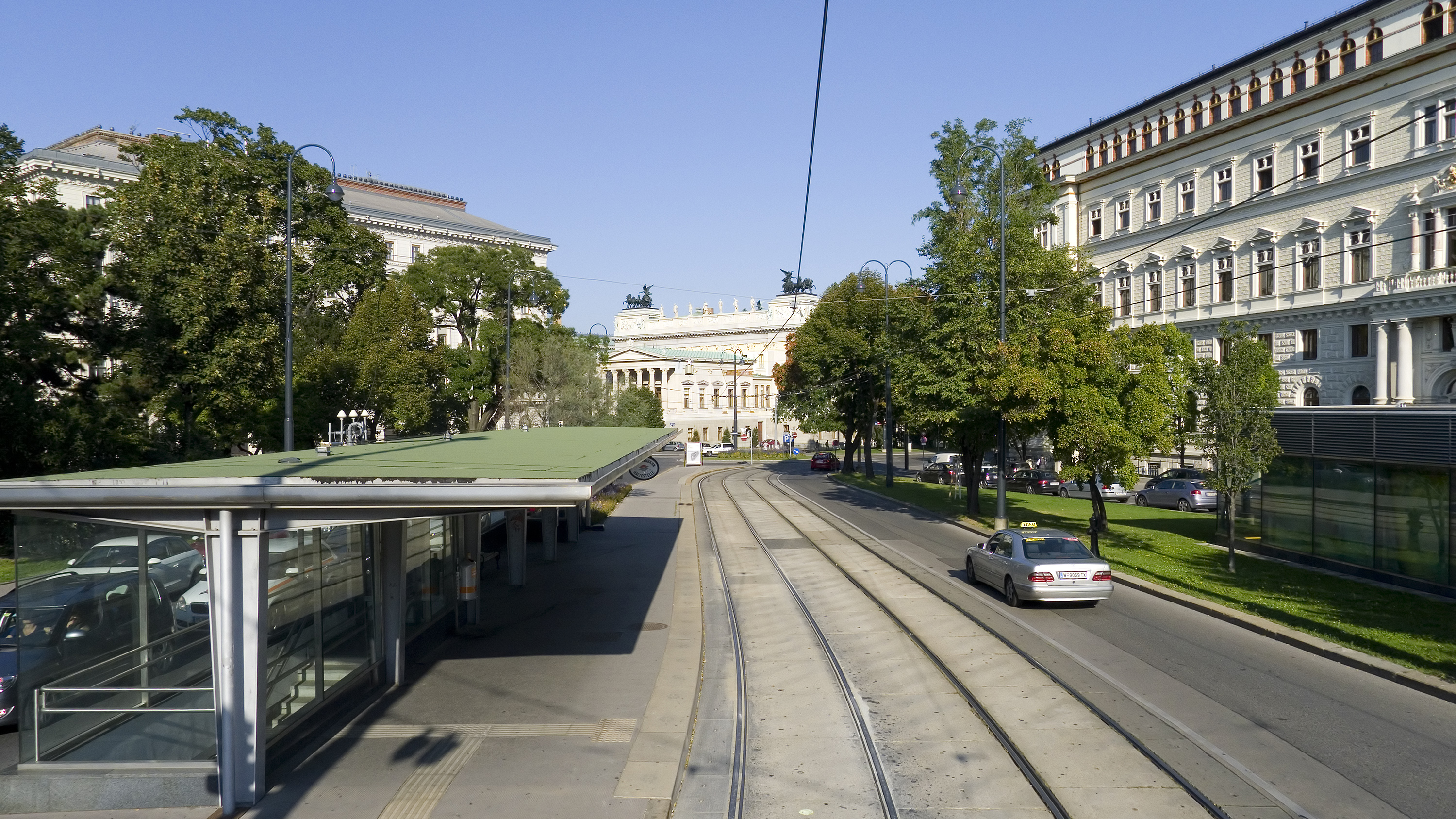 Schmerlingplatz in Wien 1 bei der Museumstraße Richtung Nordosten